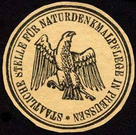 Sealing stamp Title: Staatliche Stelle für Naturdenkmalpflege in Preussen Description: Briefsiegel, weiß, schwarz Place: size: 3 cm